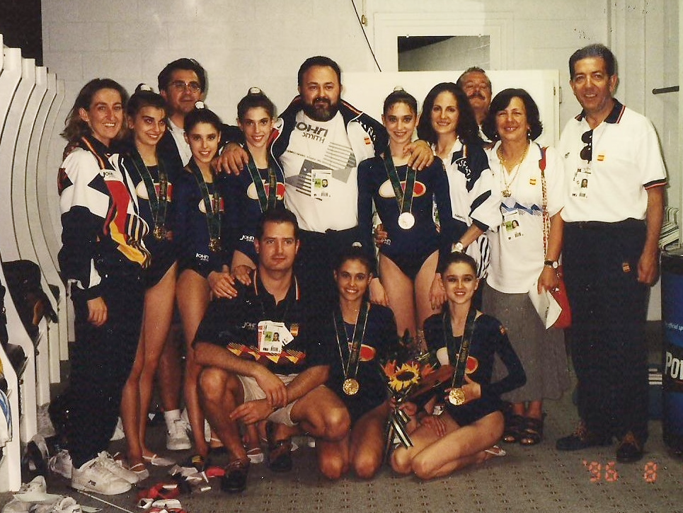 El conjunto español de gimnasia rítmica tras lograr la medalla de oro en los Juegos Olímpicos de Atlanta 1996, junto a otros miembros del equipo y varios directivos. De pie, de izquierda a derecha: María Fernández (entrenadora del conjunto), Marta Baldó, Luis González Lago (médico del equipo), Tania Lamarca, Lorena Guréndez, Amador Cernuda (psicólogo del equipo), Estíbaliz Martínez, Marisa Mateo (coreógrafa del conjunto), Eduardo Jiménez (técnico del CSD), Emilia Boneva (seleccionadora nacional) y Pedro Antonio Martín Marín (presidente del CSD). Sentados: Raúl Ruiz (fisio del equipo), Estela Giménez y Nuria Cabanillas.